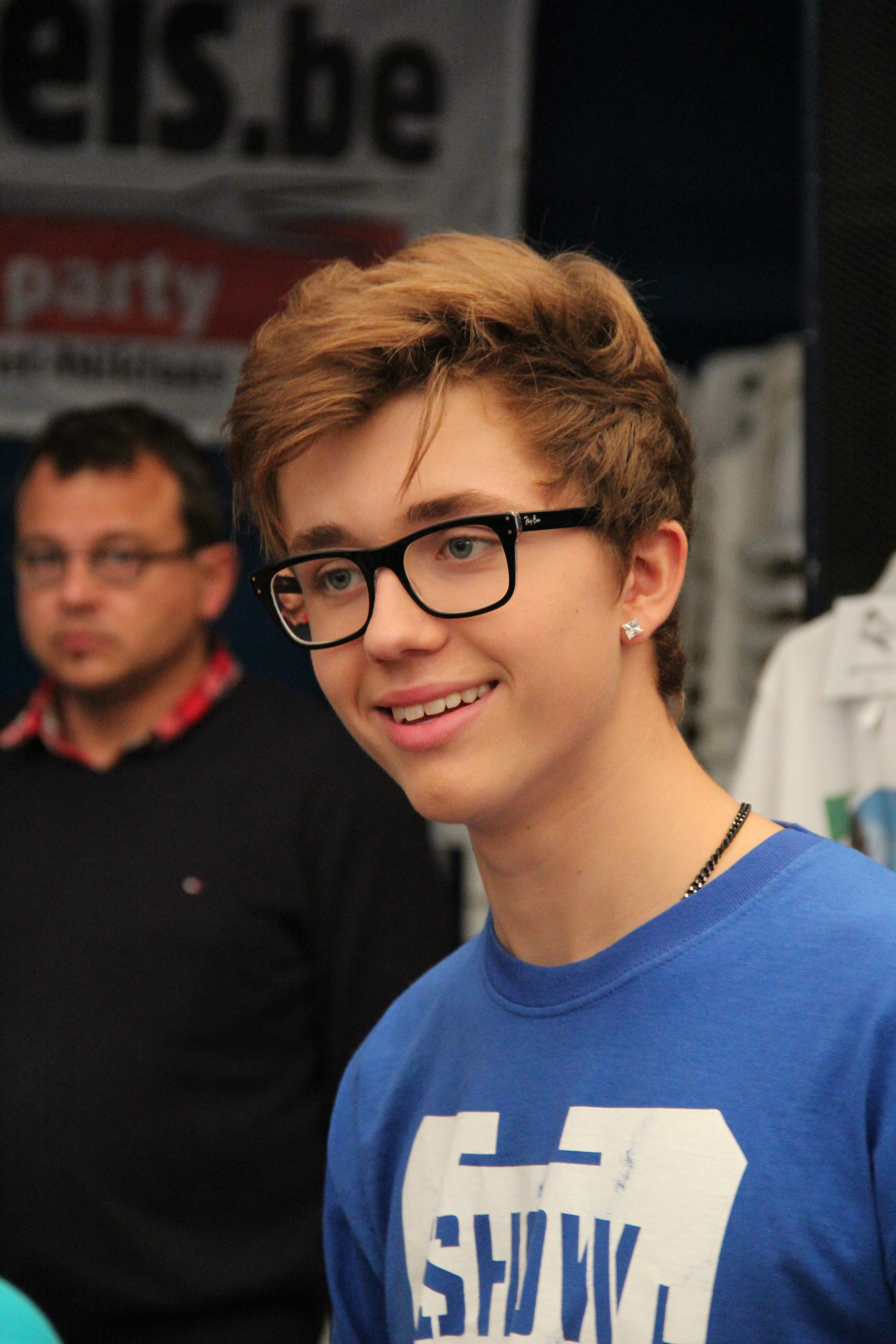 Ian Thomas tijdens signeersessie in Lochristi op 14 oktober 2012